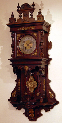 Wanduhr der Marke Lenzkirch